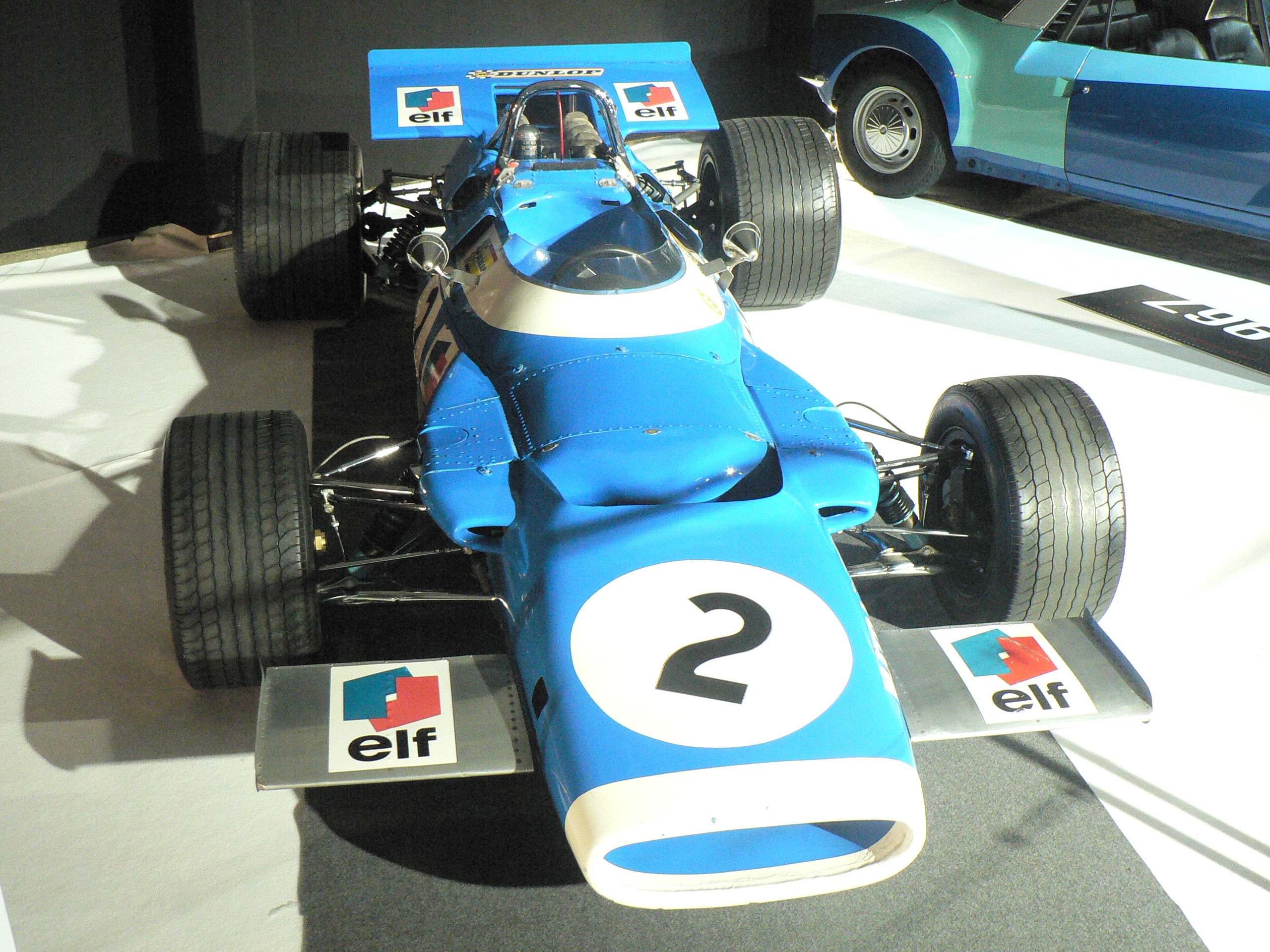 Mondial de l automobile de Paris (October 2006)